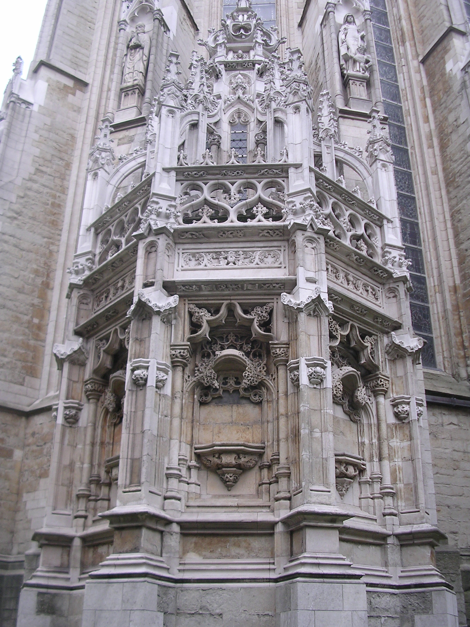 vue extérieure